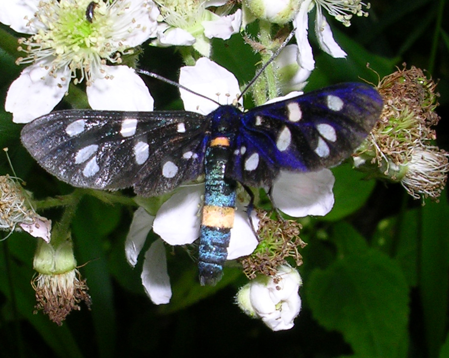 Weißfleck-Widderchen (Syntomis phegea) in Vienna (Wienerwald)